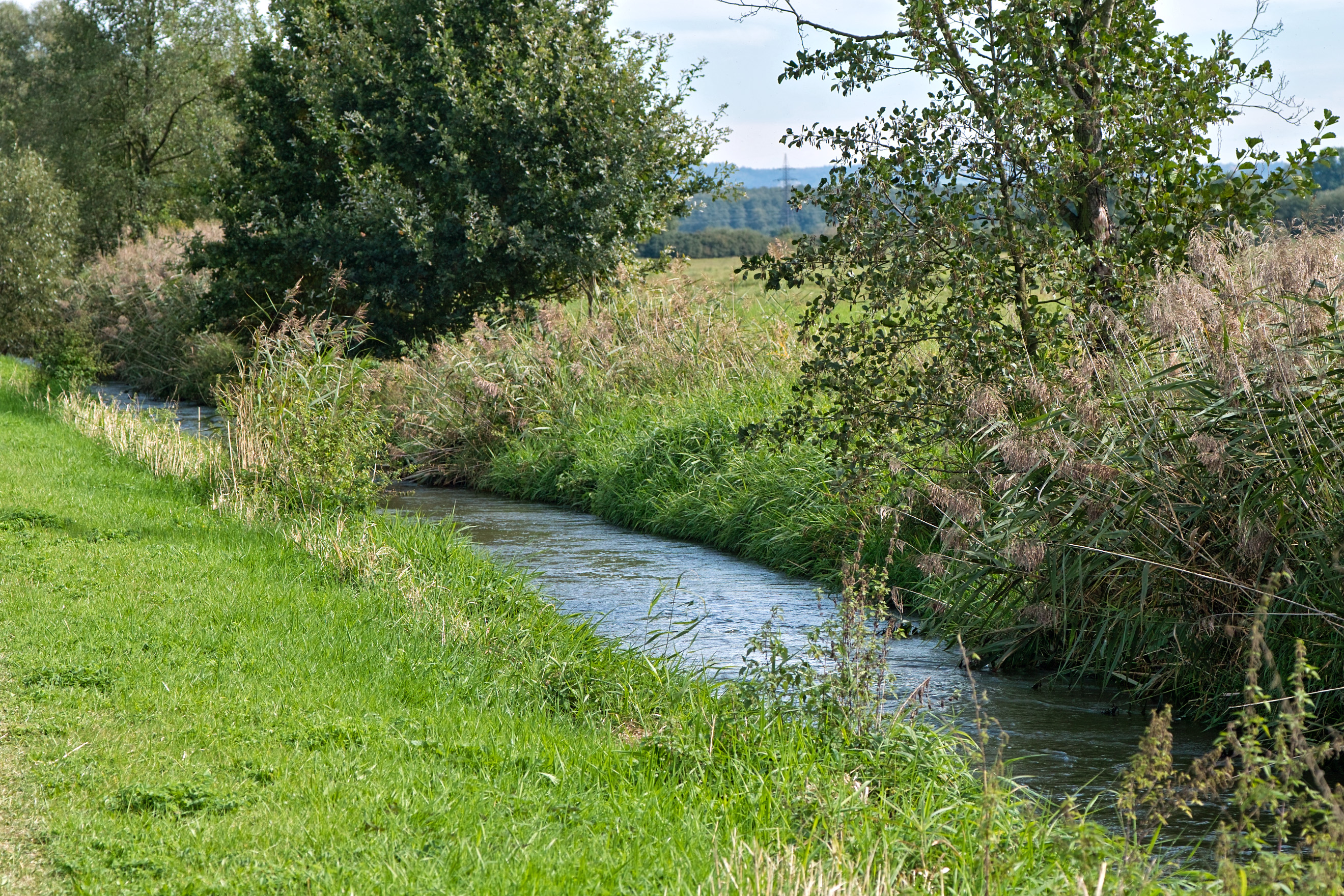 Dehtářský potok u Čejkovického rybníka, Čejkovice